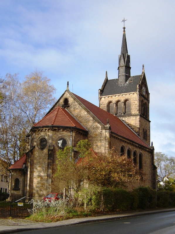 St.-Sebastian-Kirche Magdeburg-Lemsdorf, Ostansicht